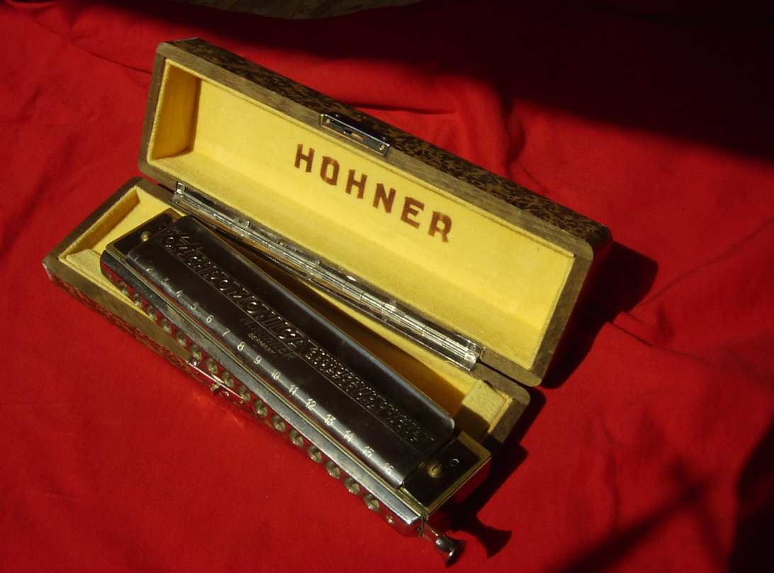 Summary Bildbeschreibung: chromatische Mundharmonika "64 Chromonica" Hersteller: M.Hohner Quelle: eigenes Foto Fotograf/Zeichner: bodoklecksel 14:18, 29. Apr 2006 (CEST) Datum: April 2006 Sonstiges